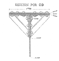 Planos del entonces llamado "Puente de Prado" sobre el Pisuerga en Valladolid (hoy el Puente Colgante), publicados por la Revista de Obras Públicas (vol. XIV, núm. 12) el 15 de junio de 1866, un año después de su inauguración.